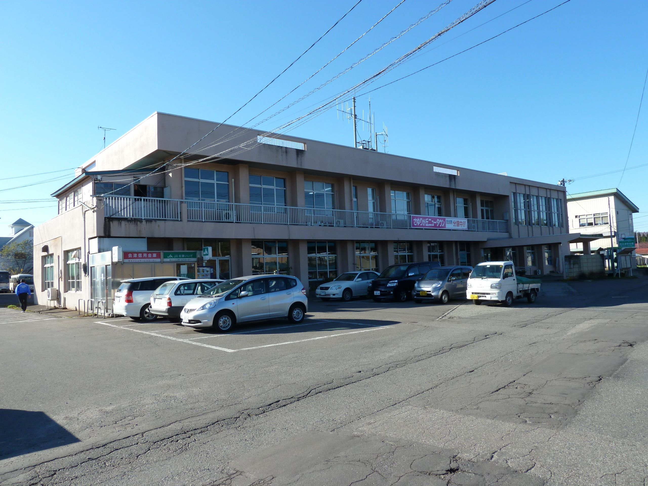 西会津町役場